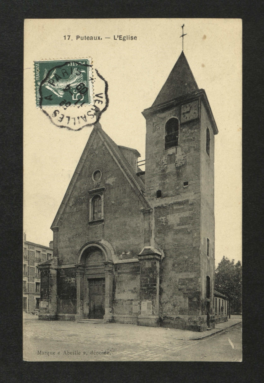 Puteaux.Eglise.Carte postale